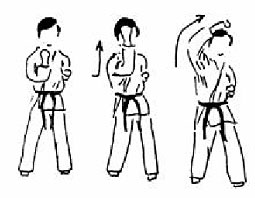 Karate, Age Uke